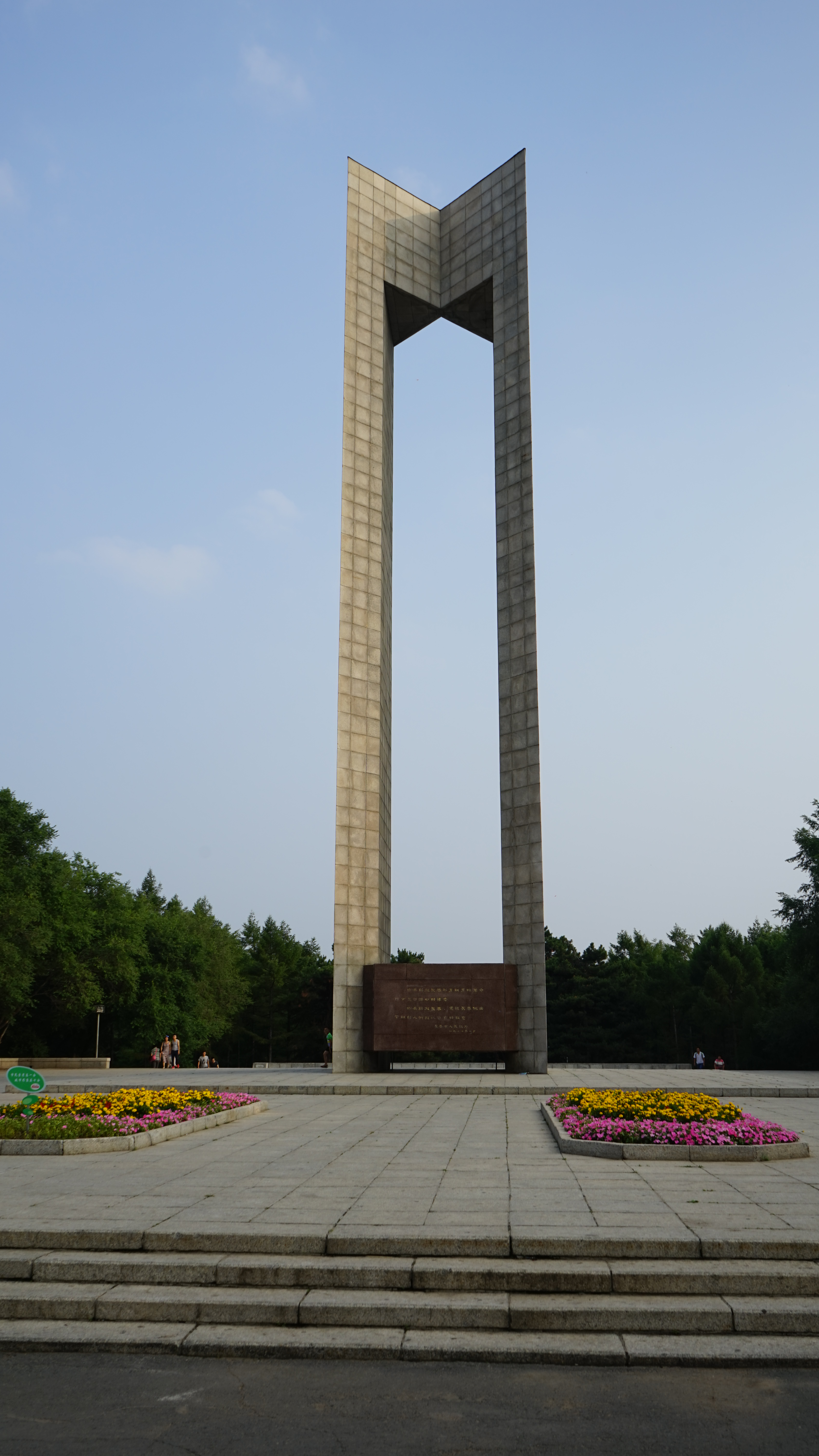 长春解放纪念碑正面、纪念碑广场